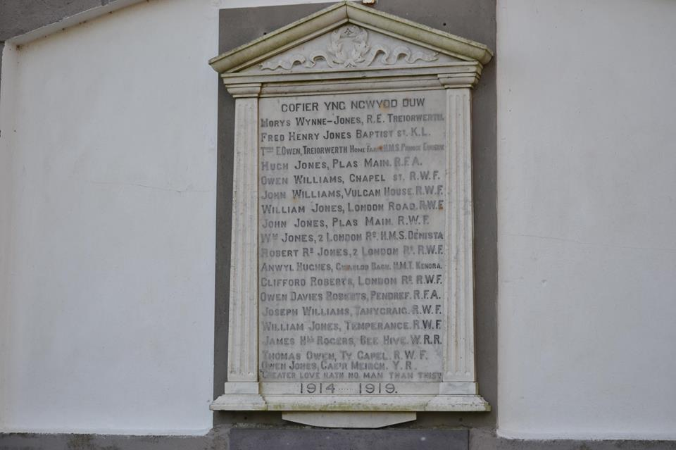 Enwau ar Cofeb ryfel Bodedern